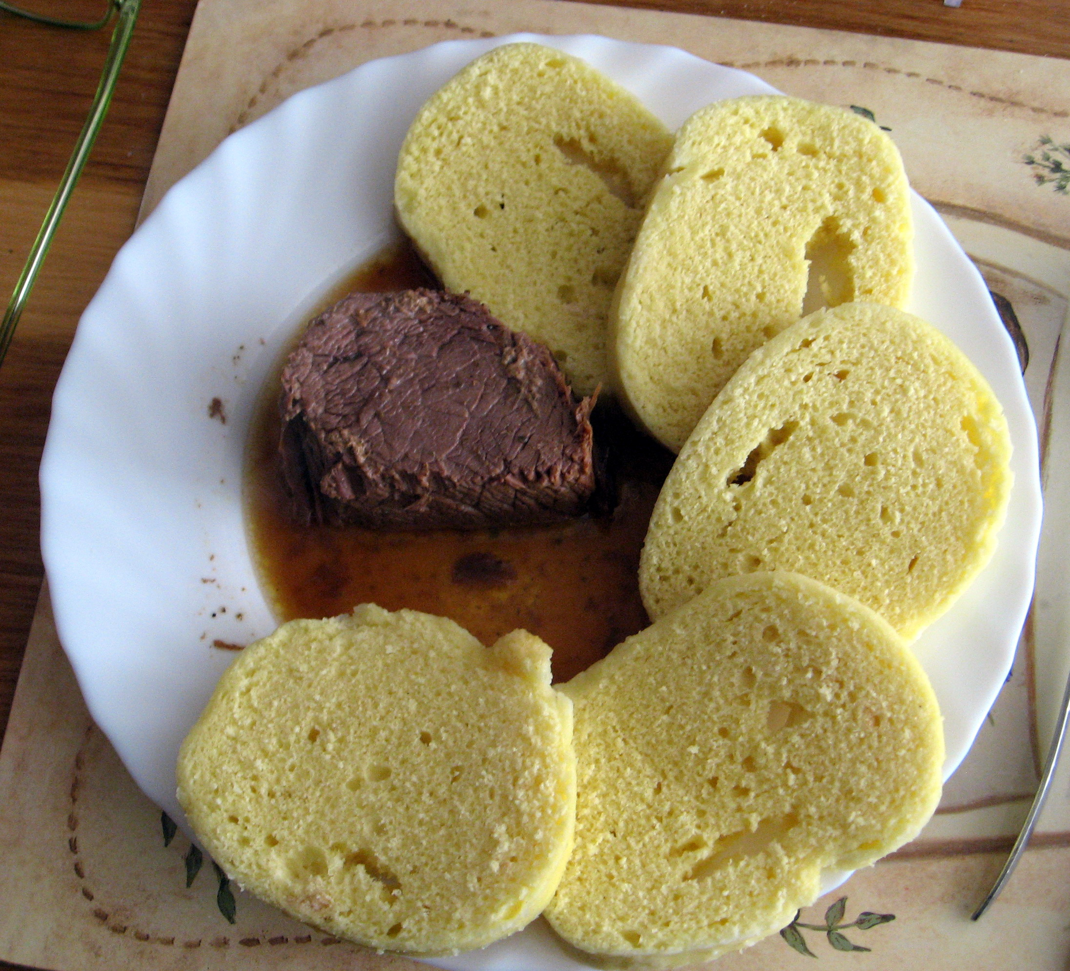 Pečené hovězí maso, houskové knedlíky